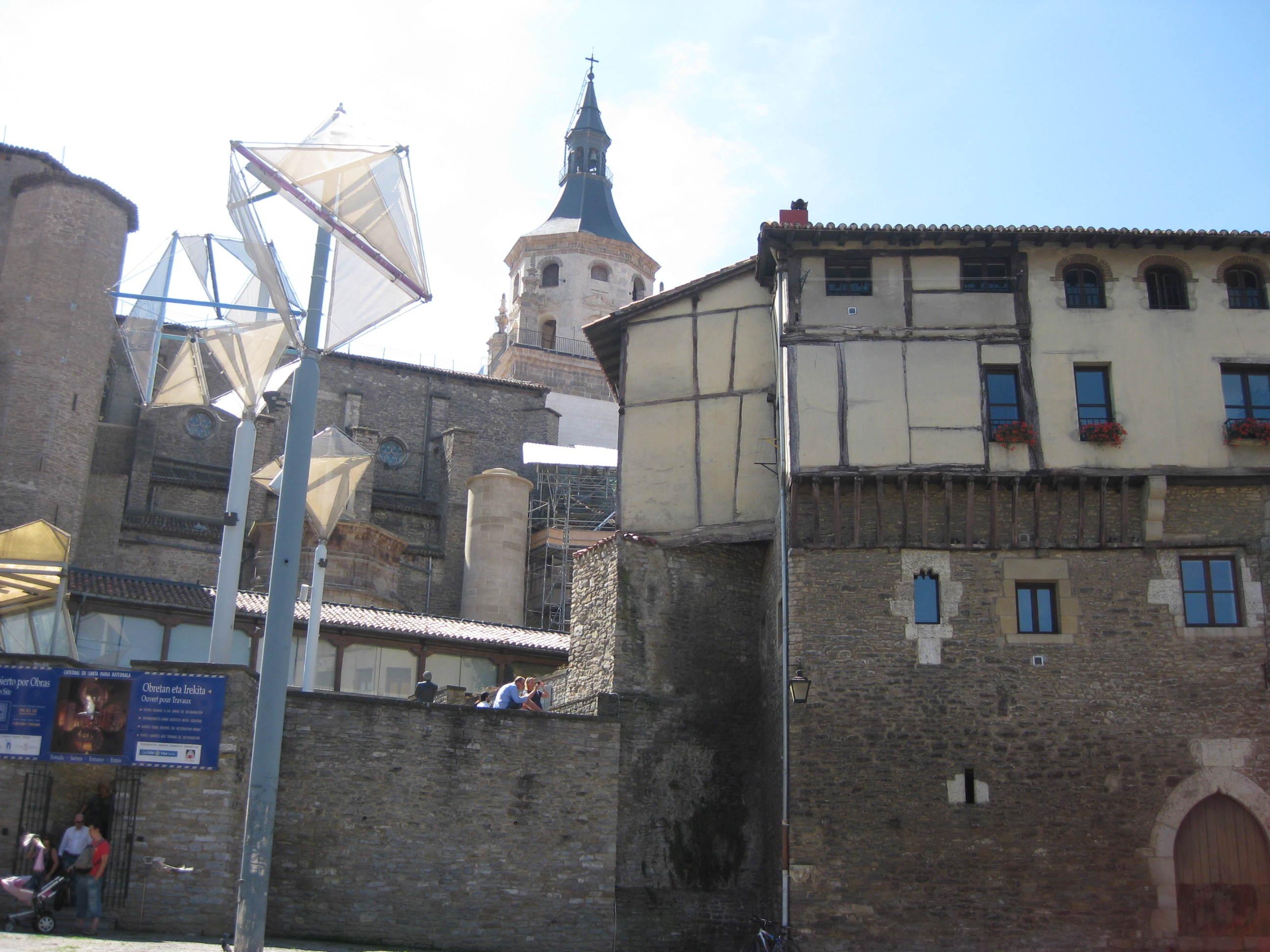 Catedral de Santa María y Torre medieval de los Hurtado de Anda en Vitoria-Gasteiz